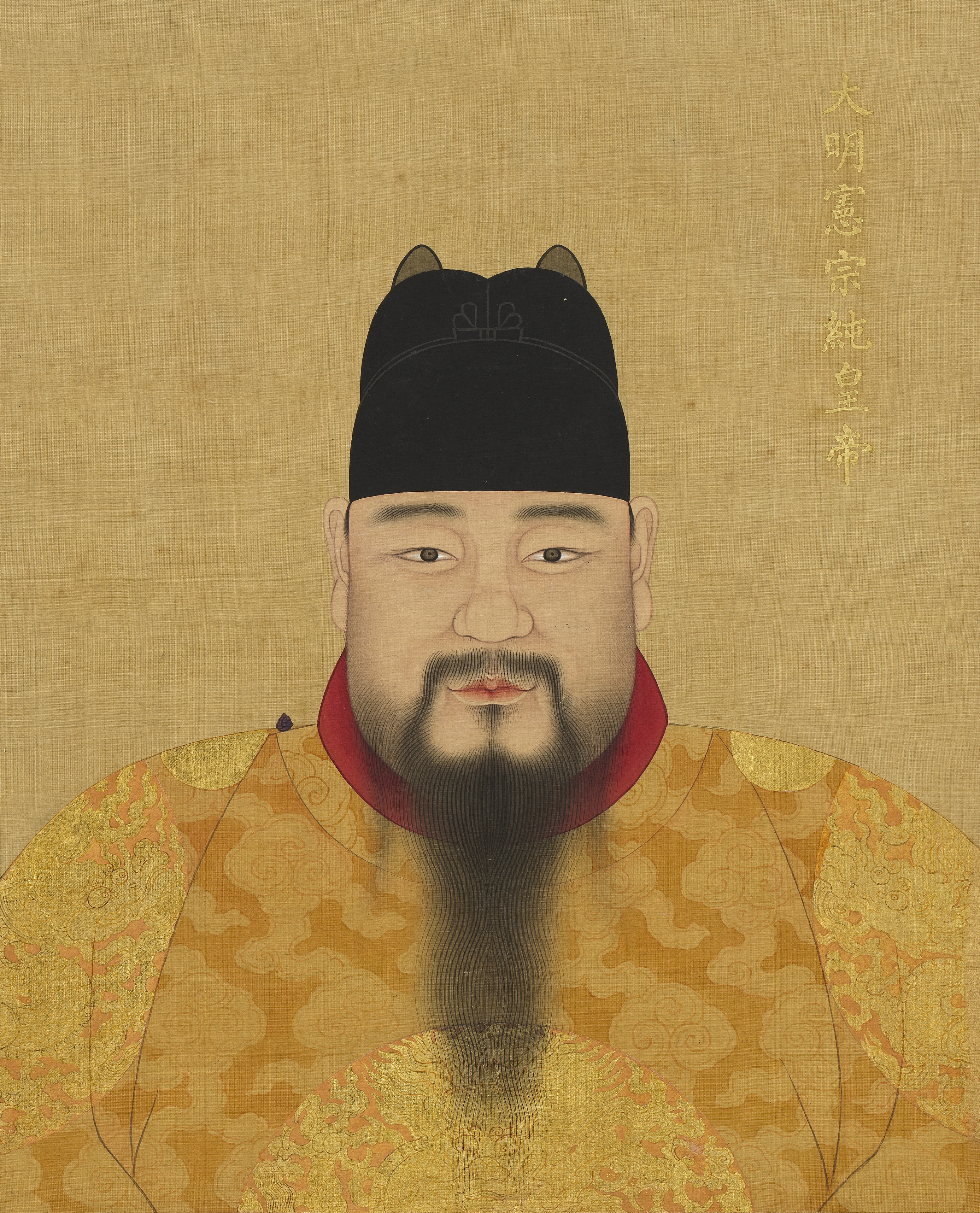 中文（中国大陆）: 作者已经去世超过200年，作品已经进入公有领域。